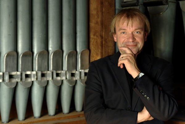 Der Kantor der Nürnberger Lorenzkirche, Matthias Ank